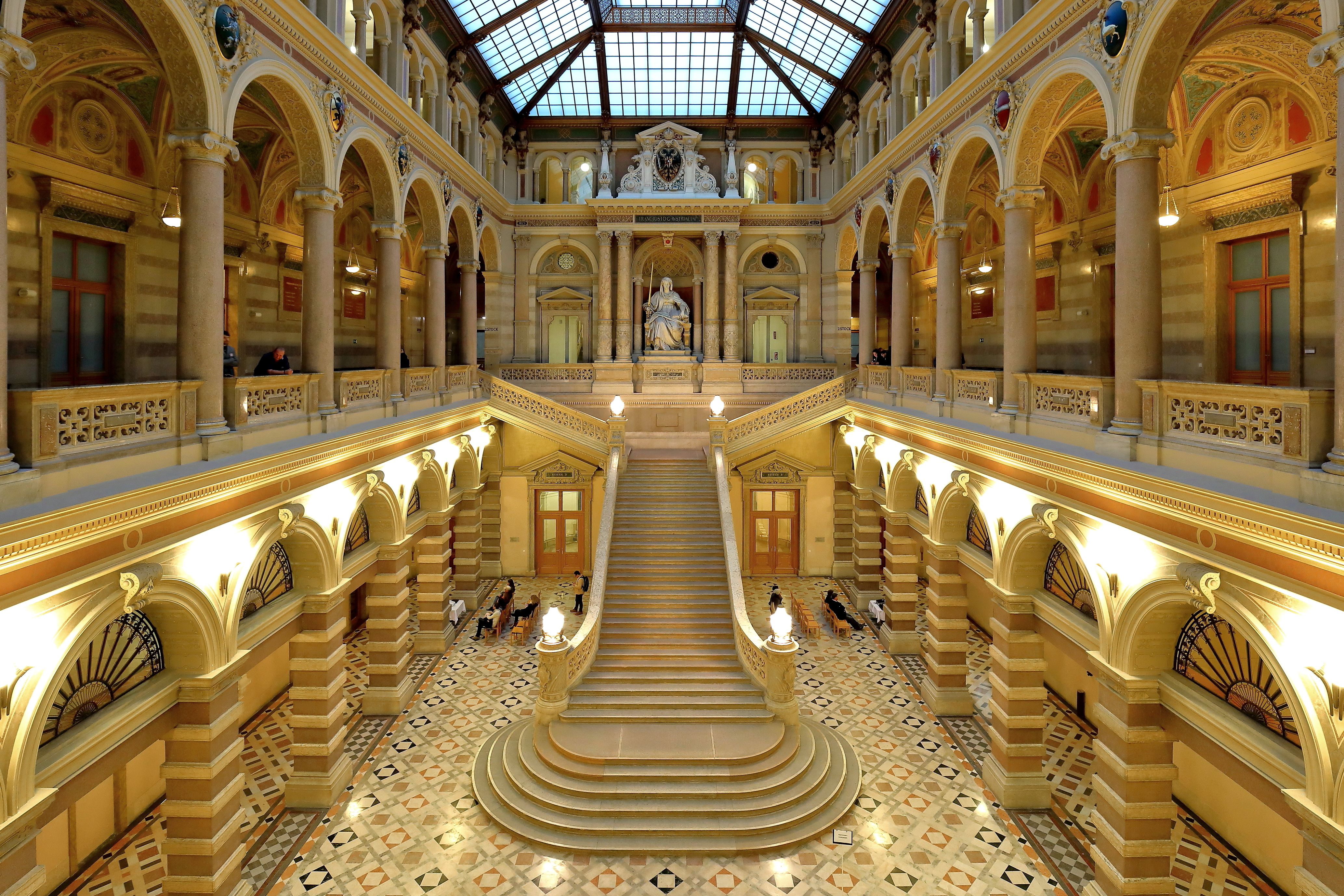 Die Empfangshalle bzw. Aula des Justizpalastes im 1. Bezirk der österreichischen Bundeshauptstadt Wien.Der Justizpalast wurde von 1875 bis 1881 nach Plänen von Alexander Wielemans von Monteforte im Stil der Neorenaissance erbaut. Besonders prunkvoll ist die Empfangshalle, ein dreigeschossiger, glasgedeckter Arkadenhof mit einer Länge von 31m, einer Breite von 15m und einer Höhe von 23m. Vom Zentrum führt eine pompöse Freitreppe ins 2. Obergeschoss. Die optische Verlängerung der Stiege endet bei der monumentalen Marmorstatue Justitia, die sitzend mit einem Schwert und einem Gesetzbuch in einer Nische thront.